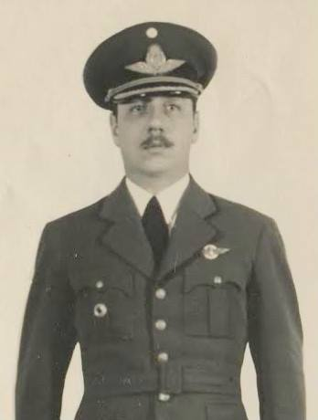 El Brigadier General Ángel Jorge Peluffo.